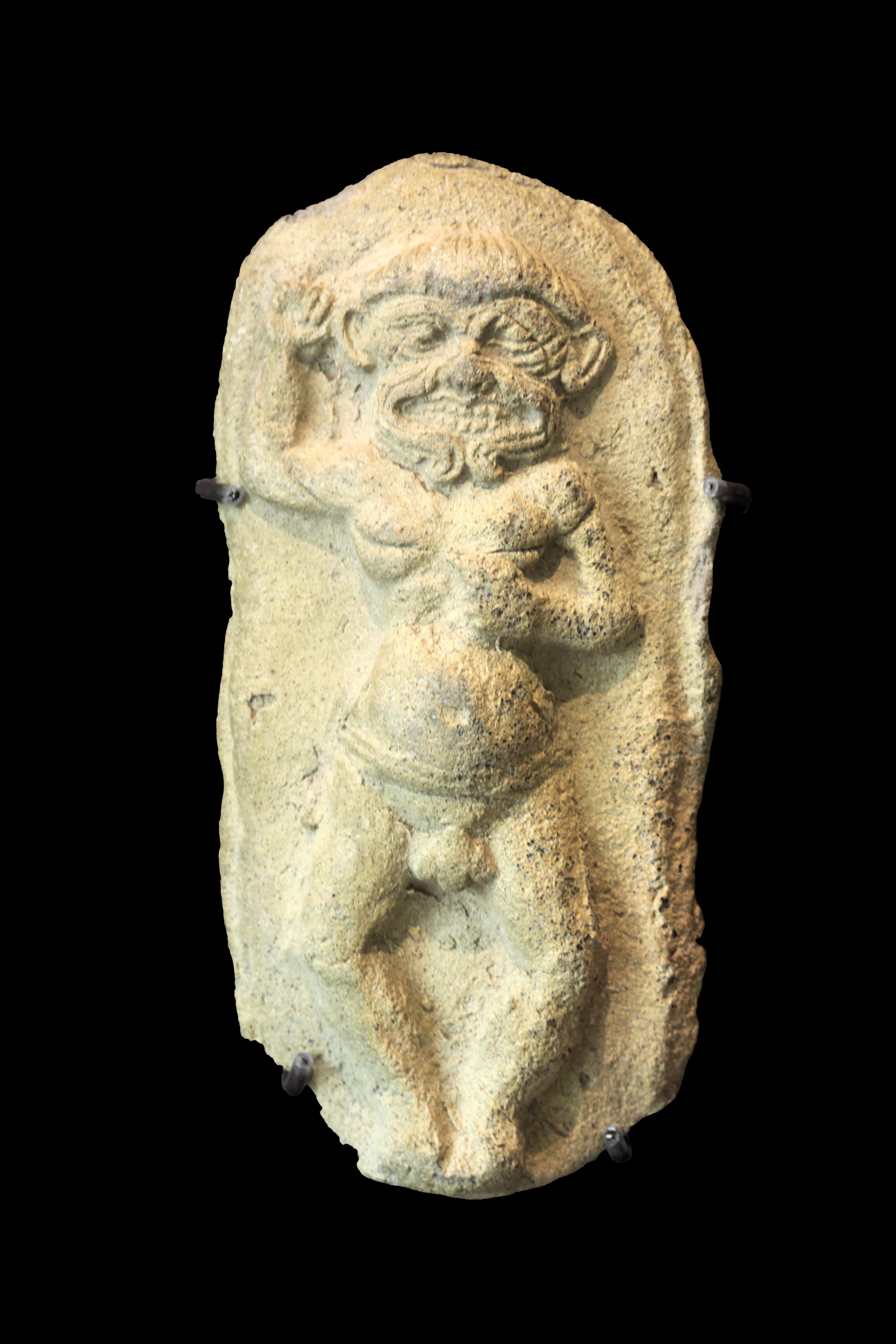 Humbaba